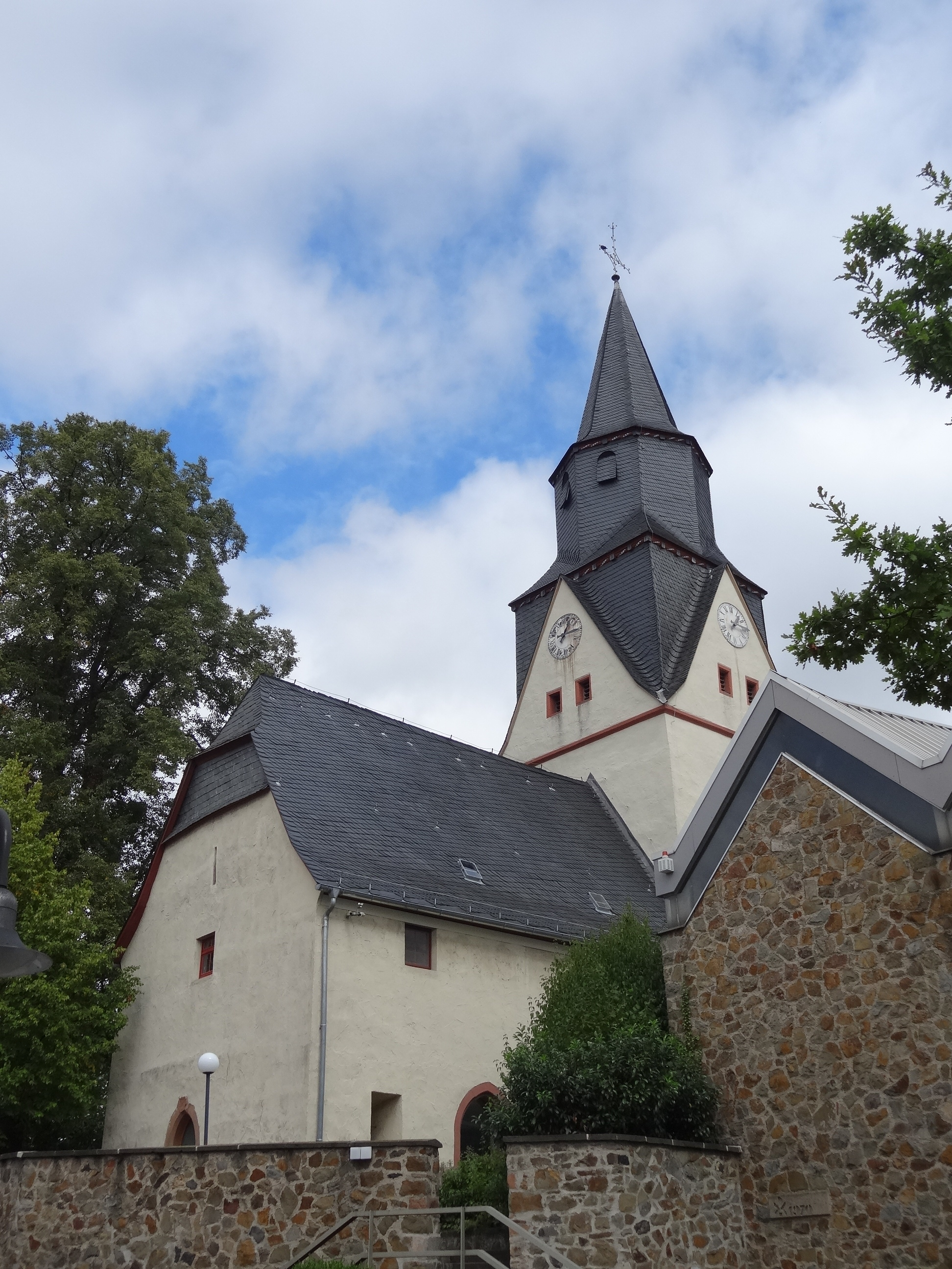 Evangelische Kirche (Heuchelheim, Hessen)